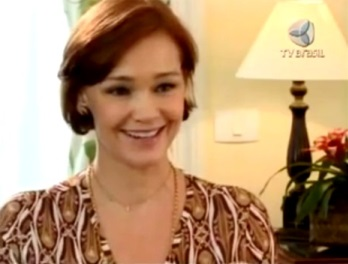 Atriz brasileira Júlia Lemmertz em imagem do acervo da TV Brasil.